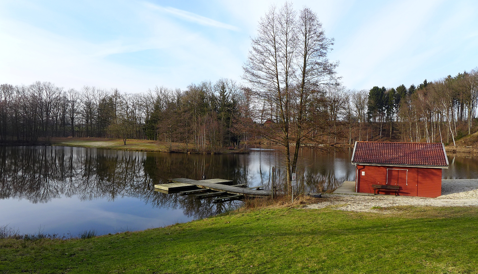 Von der Brunau gespeister See in Behringen.